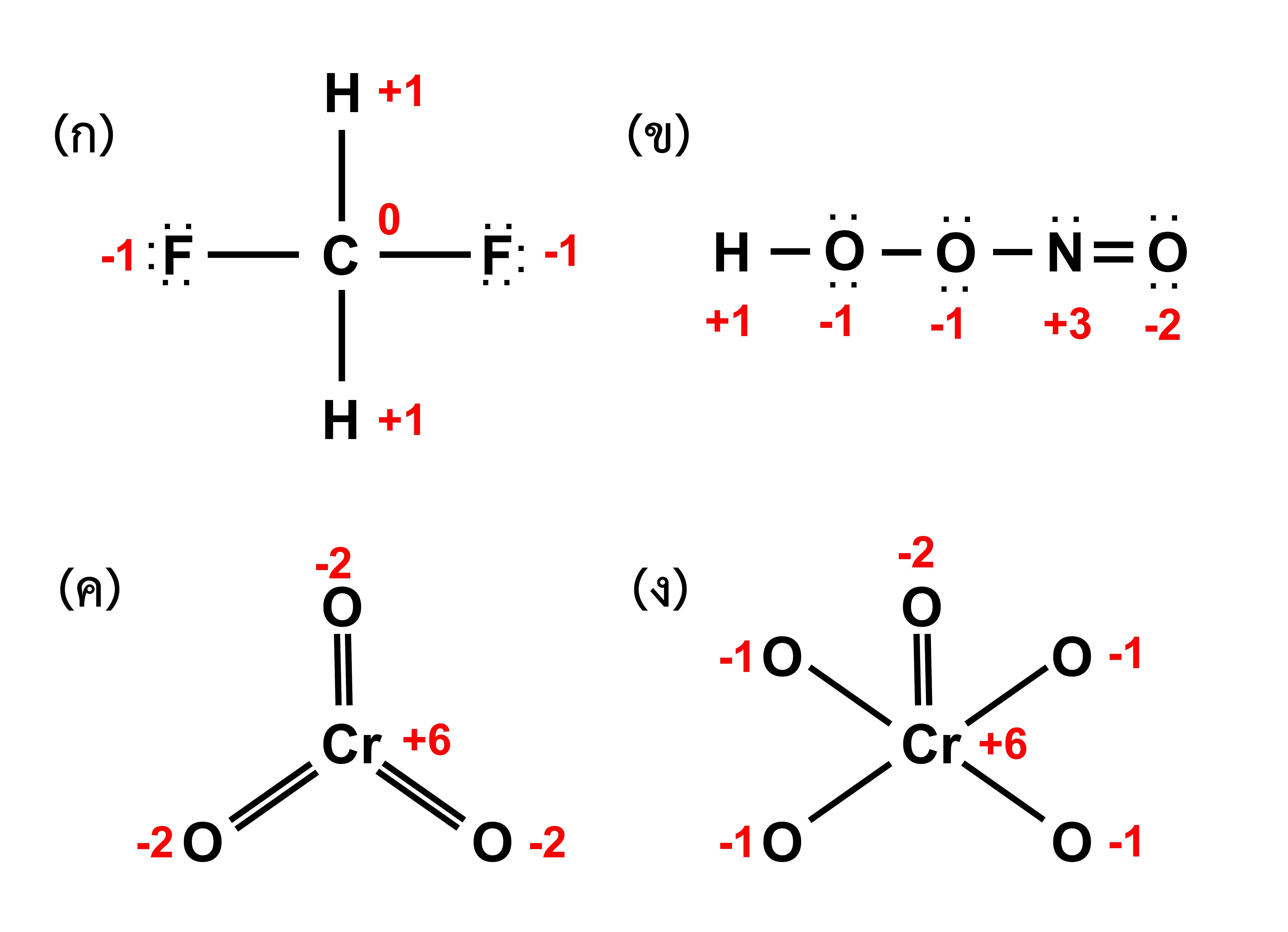 Oxidation State Assignments